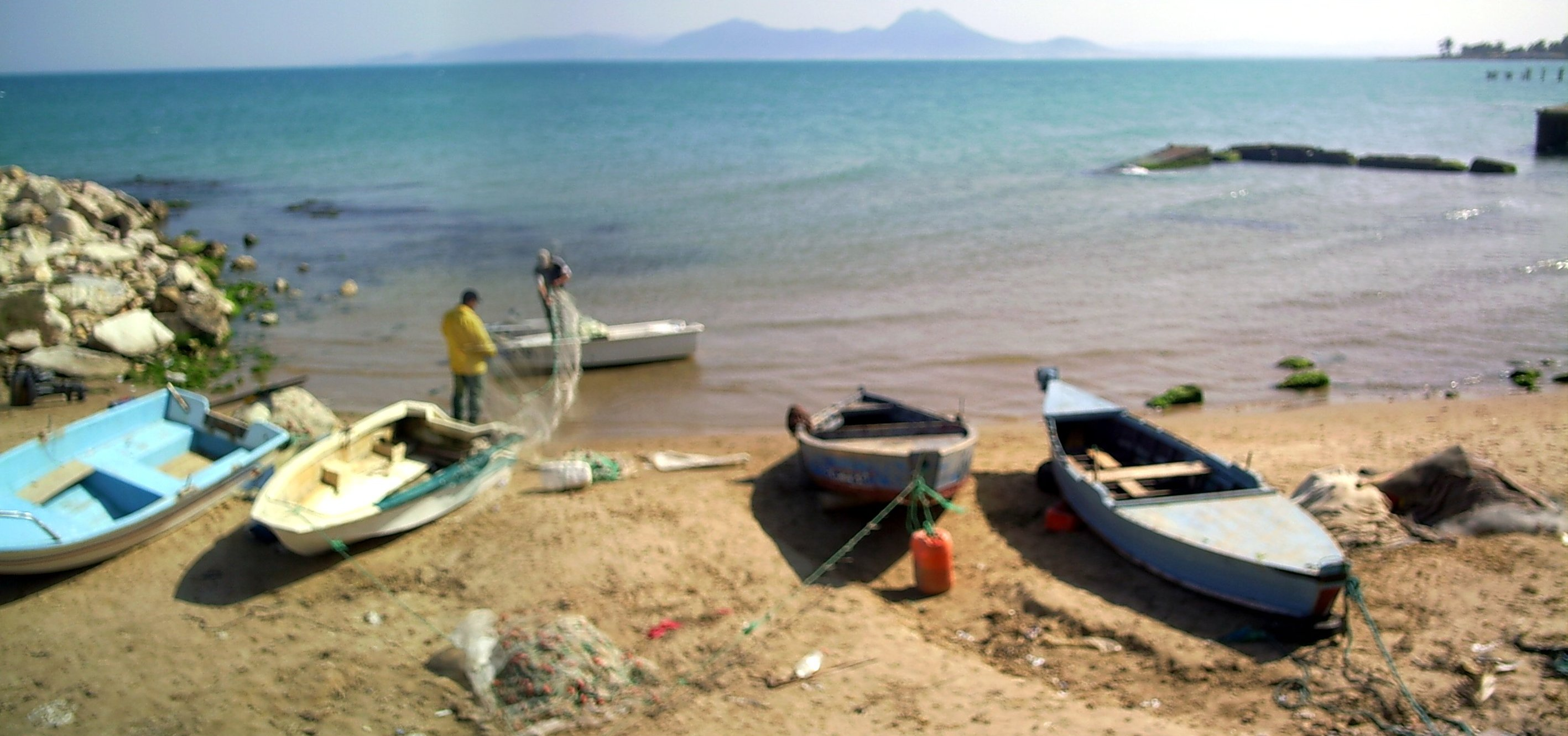 Vista del Port Púnic de Tunis. Abril 2007.